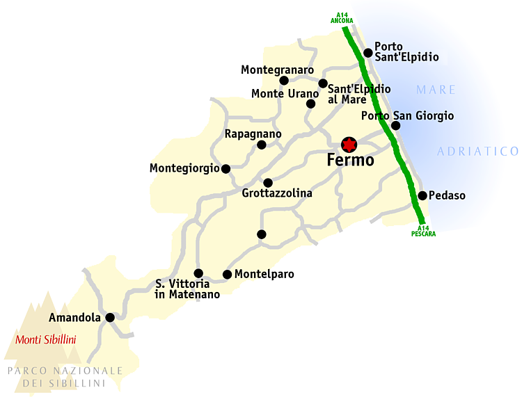 Kaart van de provincie Fermo